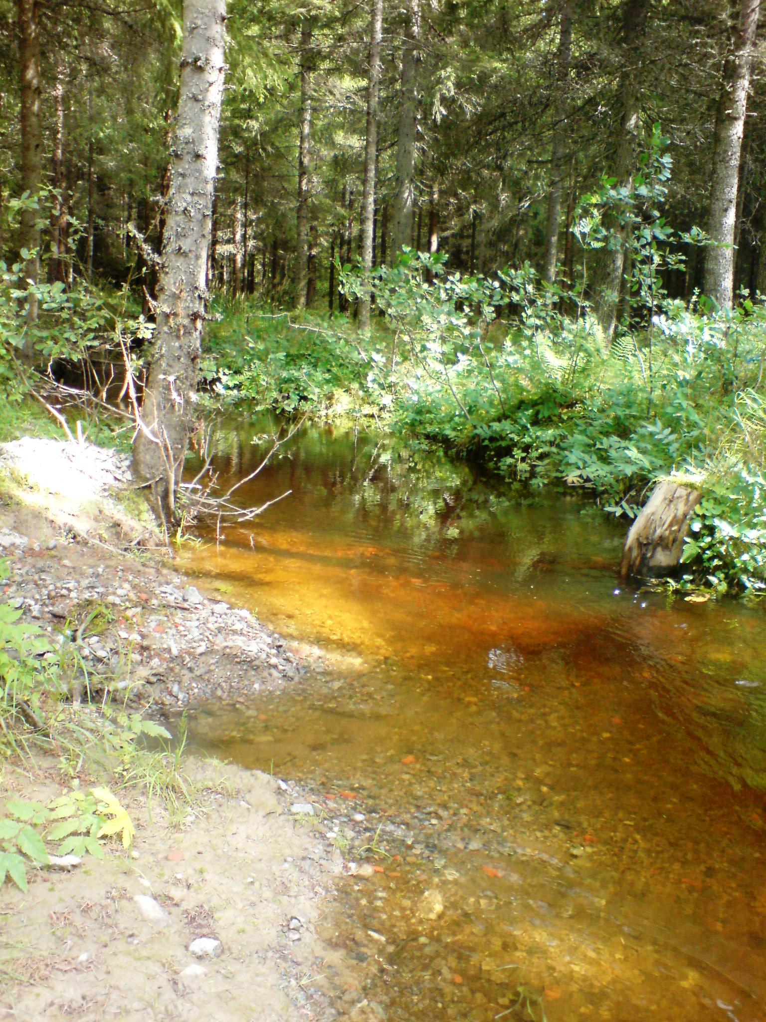 Bjønnebekken på Lierfoss i Aurskog-Høland kommune.